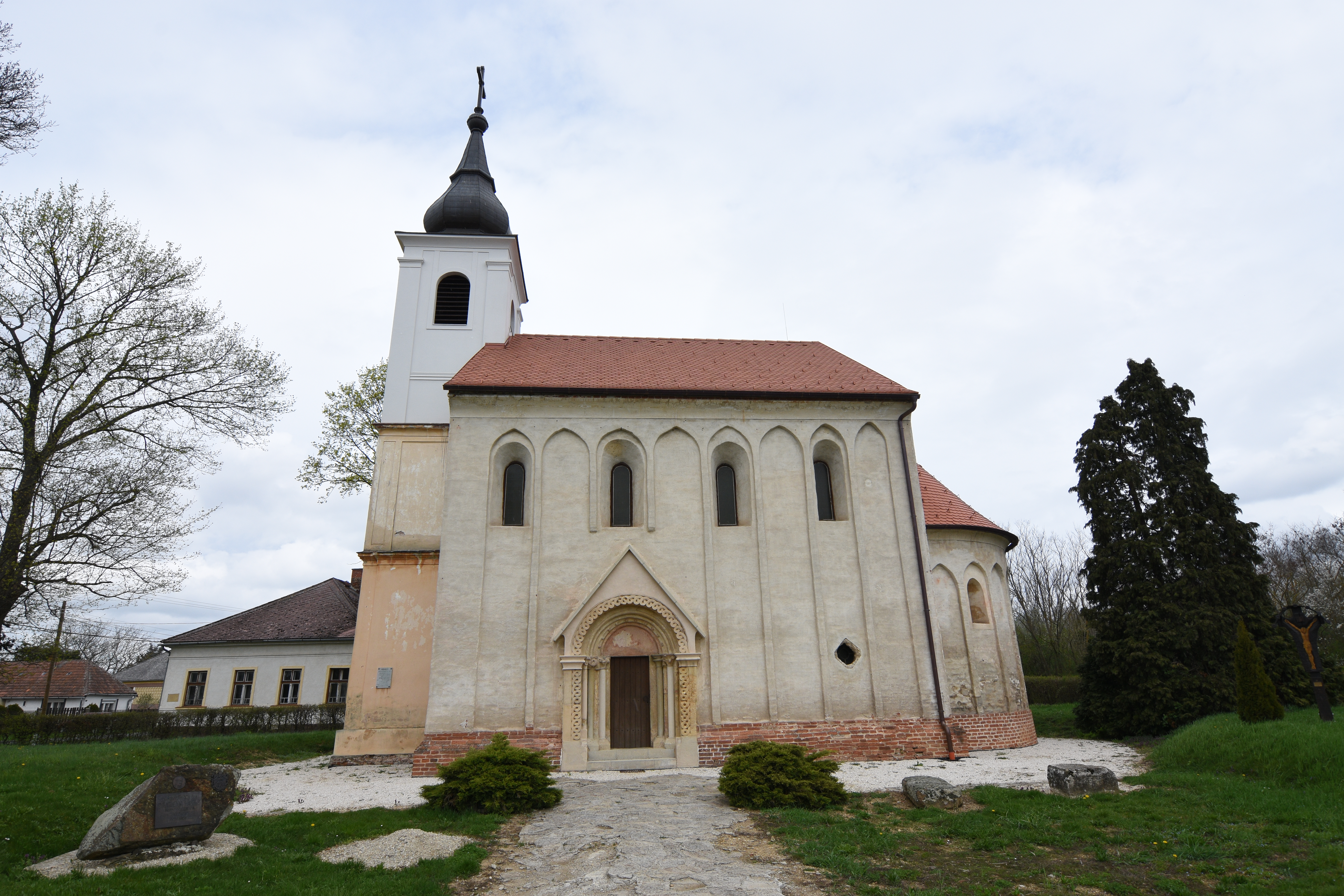 Kisboldogasszony templom, Egyházasszecsőd